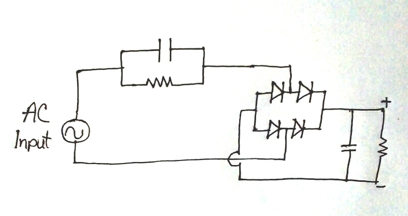 ক্যাপাসিটর দিয়ে পাওয়ার সাপ্লাই তৈরি ।